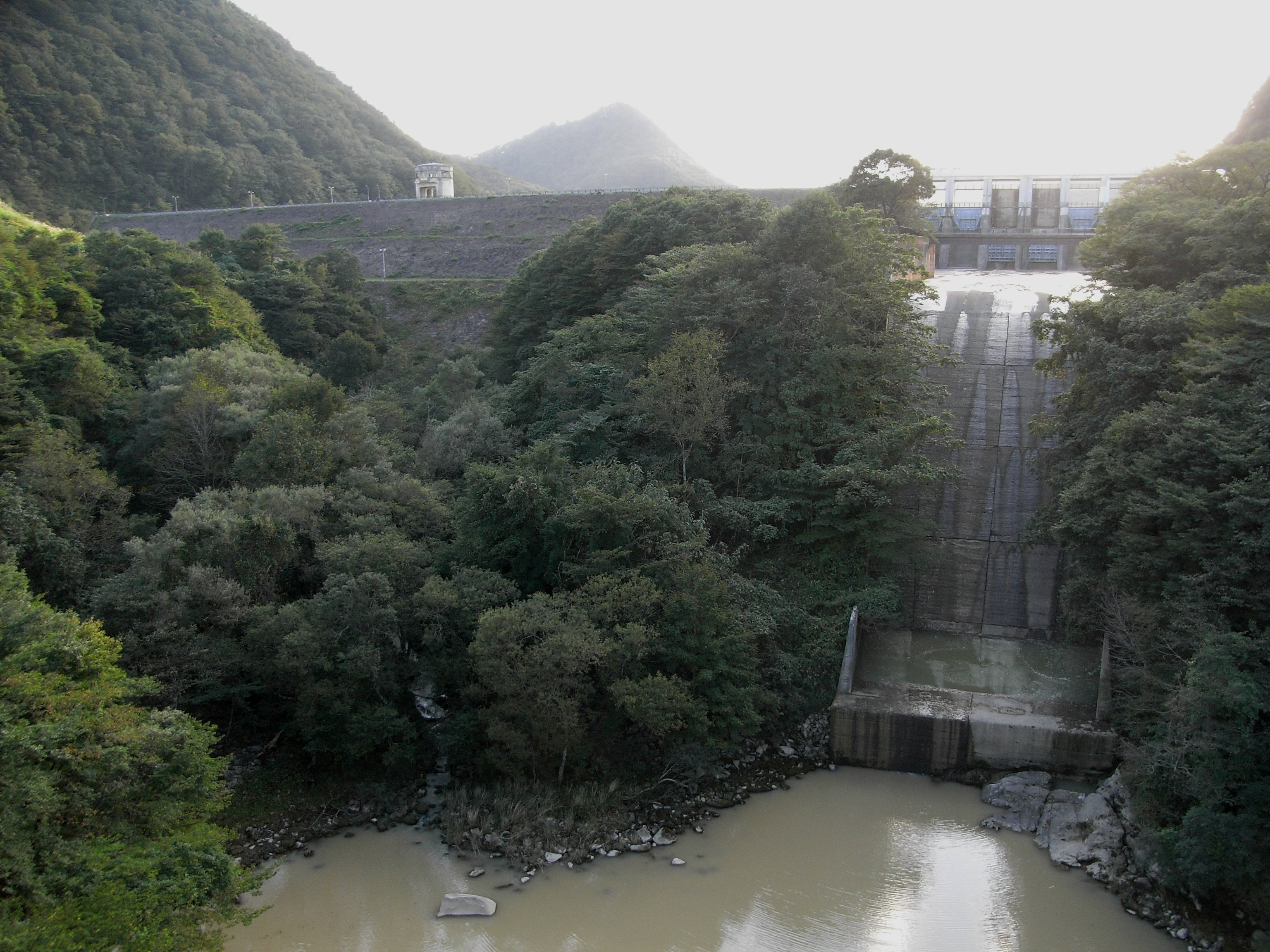 Dam